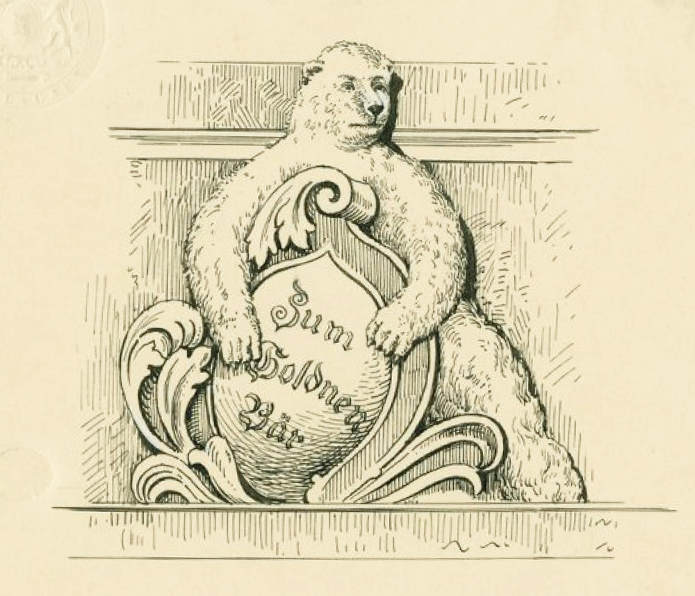 Das Hauszeichen des Hauses "Goldener Bär" in Leipzig um 1900